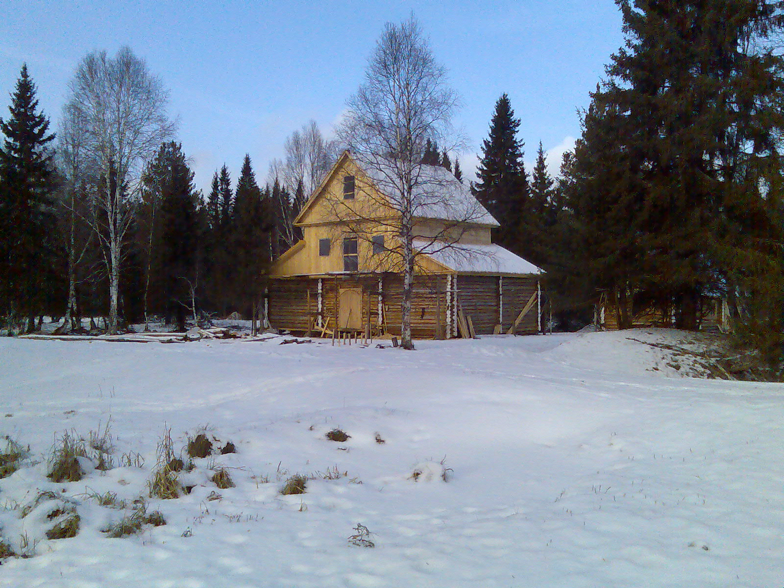 Новый дом